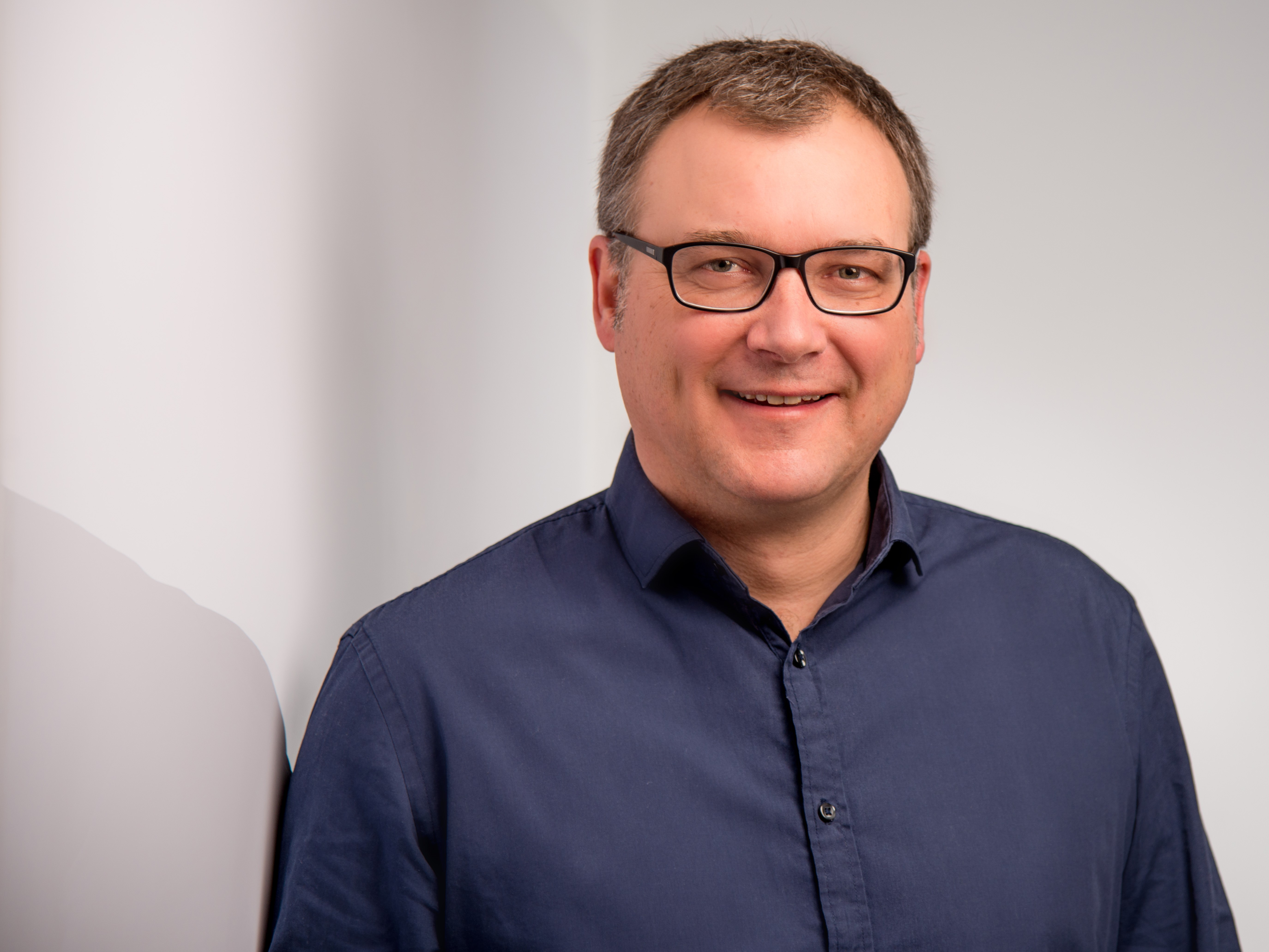 Journalist, Autor und Filmemacher Sascha Adamek im Jahr 2017. Porträtaufnahme von ...